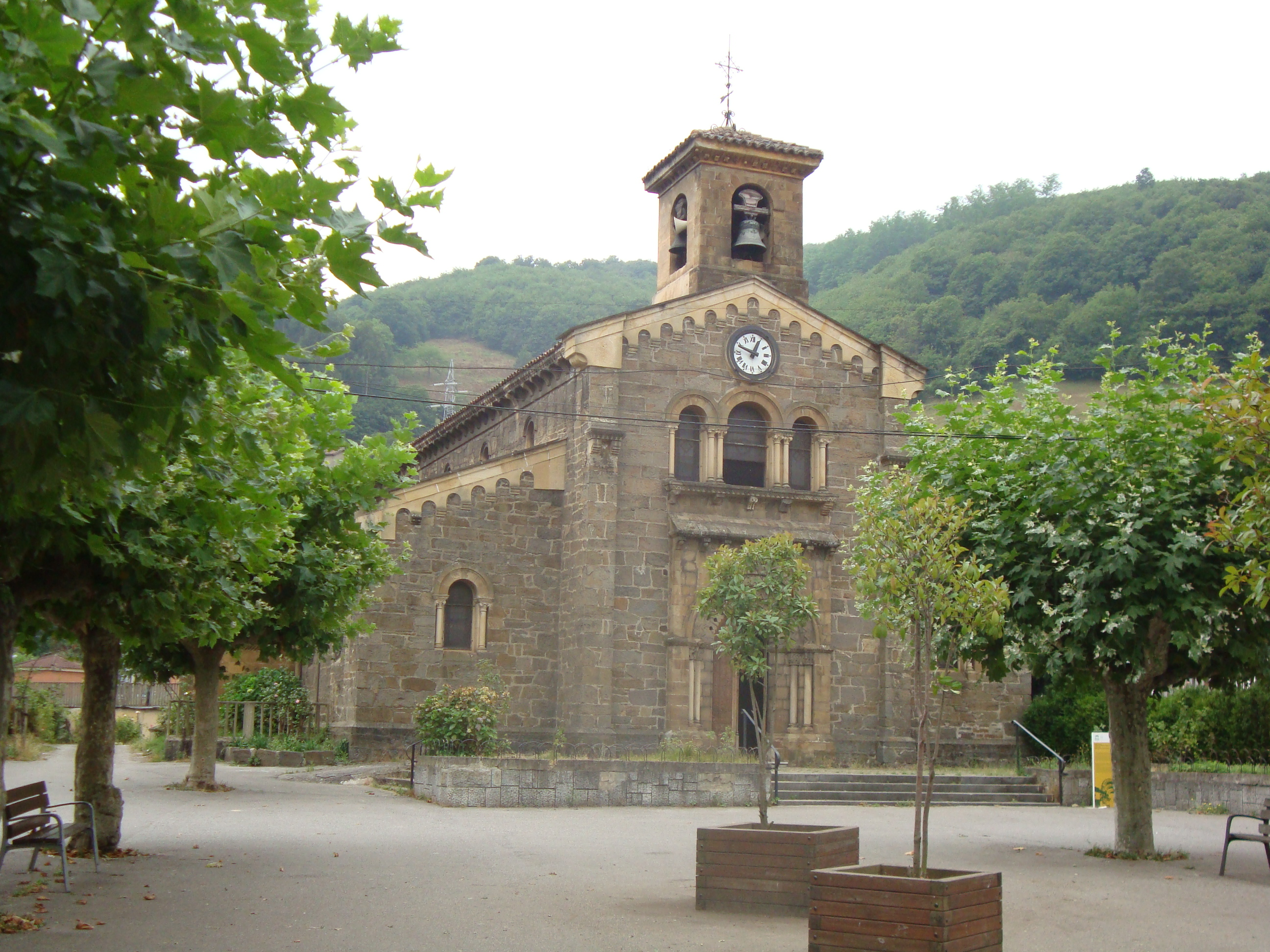 Iglesia de Santa Eulalia en Ujo (Mieres, Asturias, España).